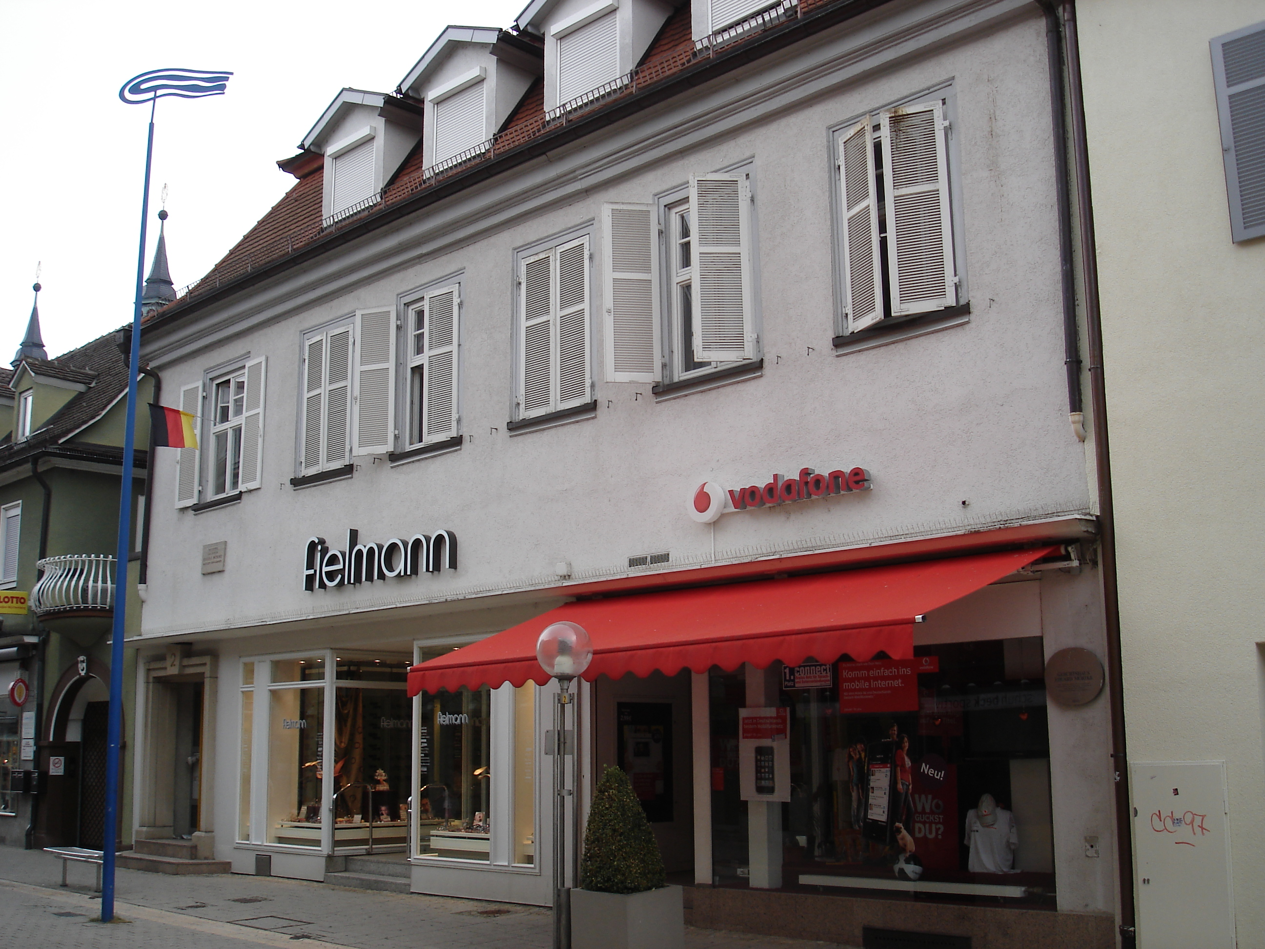 Mörikes Geburtshaus in Ludwigsburg, Kirchstraße 2